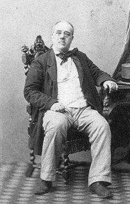 Gustavo Modena (1803 – 1891), attore e patriota italiano.